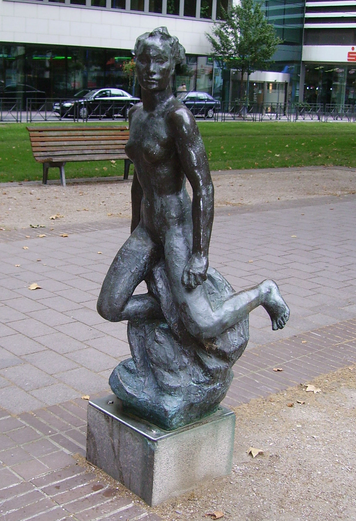 Ludwigsplatz in Ludwigshafen, Germany